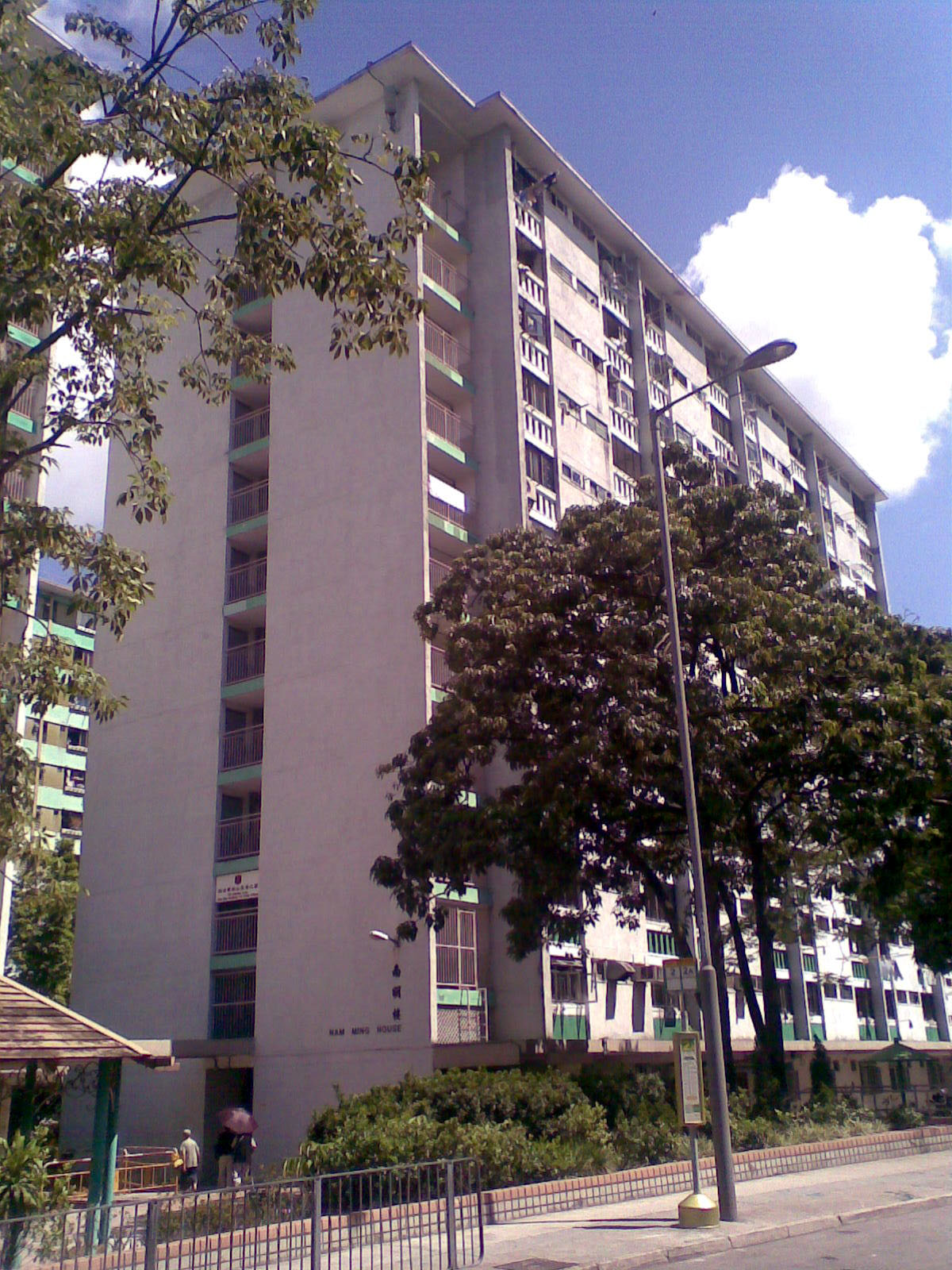 南山邨南明樓